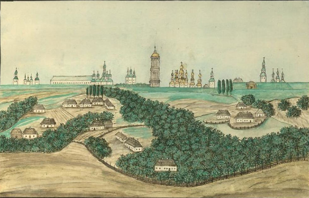 Звіринець Печерський. Домінік П'єр де ля Фліз. «Медико-топографічний опис державних маєтностей Київської округи з зображенням деяких природних витворів рослинного і тваринного світу, разом із статистикою кожного села, їхнім виглядом, зробленим з натури, зображенням селянських костюмів та географічною картою Київської округи». Київ, 1854. - С. 740.